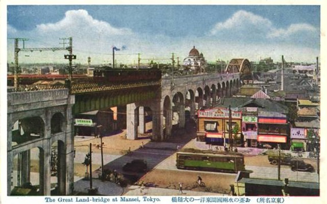 （東京名所）お茶の水両国間東洋一の大陸橋